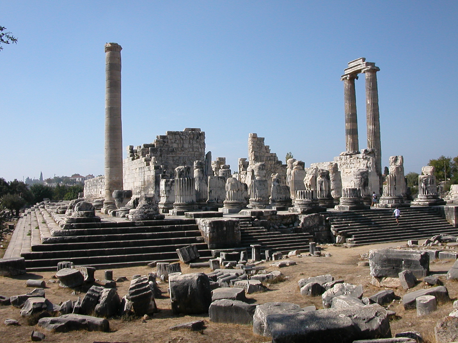 Apollon-Tempel bei Didyma.; eigenes Foto; Lutz Langer; Freigegeben